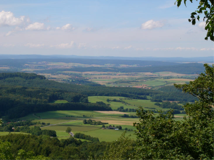 Das Foto zeigt einen Teil des Gebietes der Gemeinde Hofbieber. Aufgenommen wurde es von der Milseburg. Copyright Status: GNU Freie Dokumentationslizenz